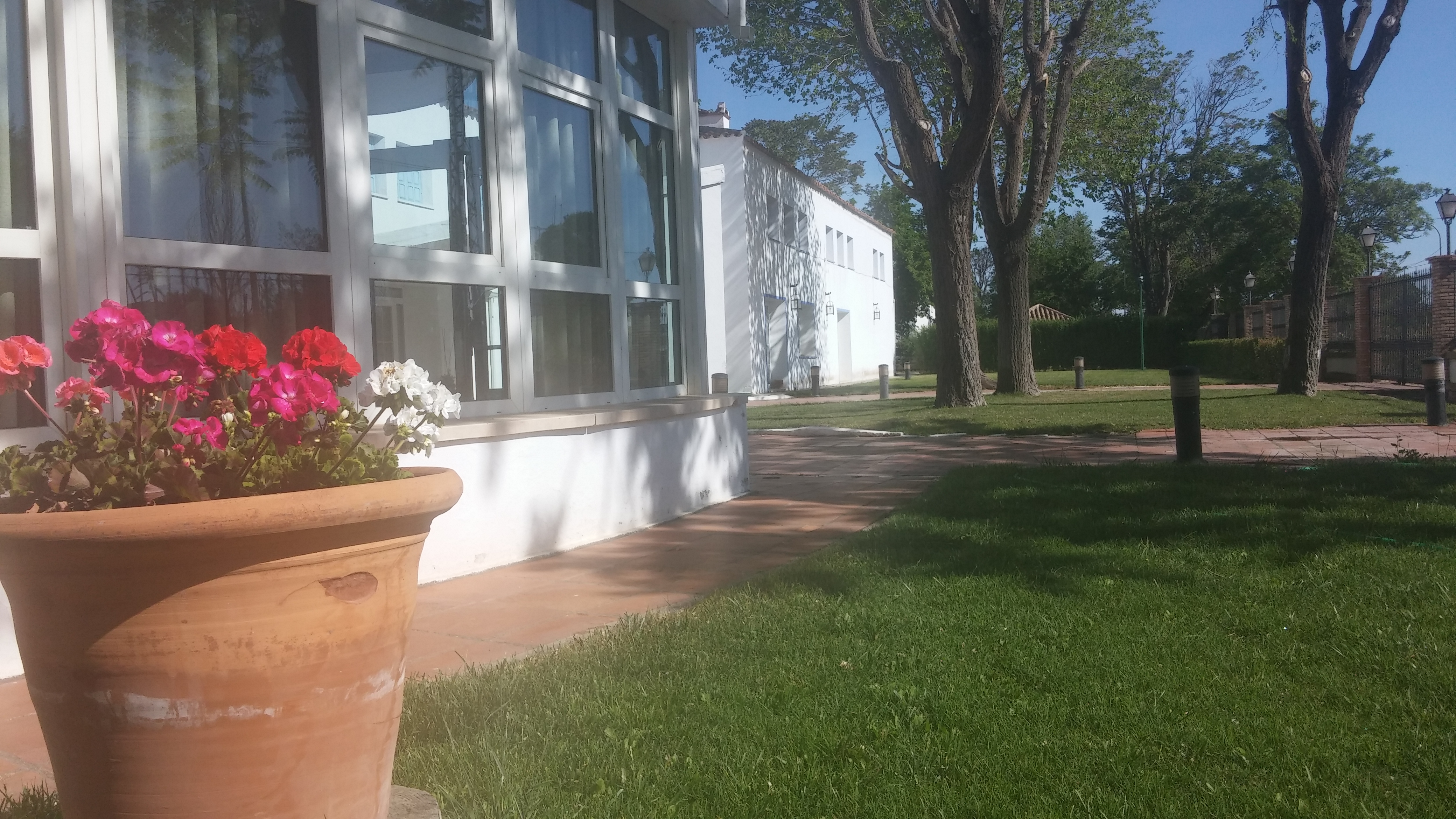 El comedor semicircular desde el jardín. La pérgola ha sido incorporada al comedor para dotarlo de mayor capacidad. Su aspecto exterior si bien está modificado respecto al inicial es excelente.